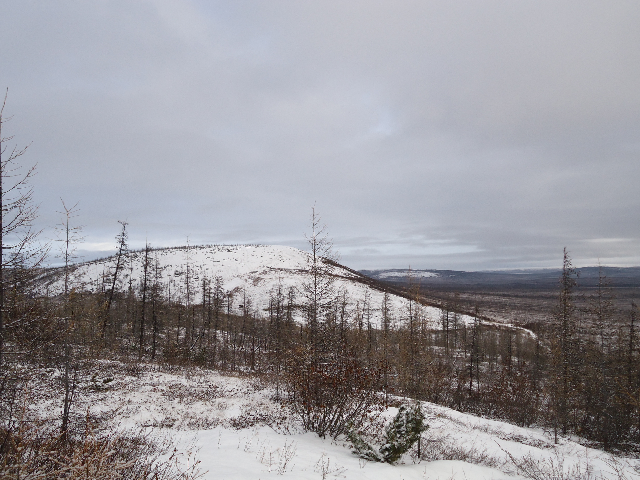 На сопках